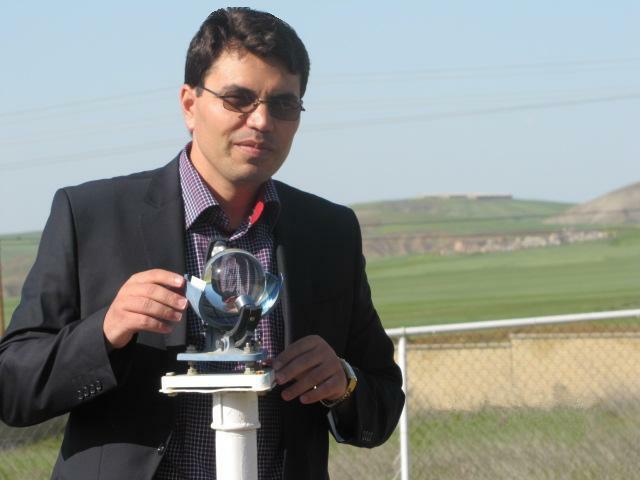 ديده بان هواشناسي درحال تعويض كارت آفتابي